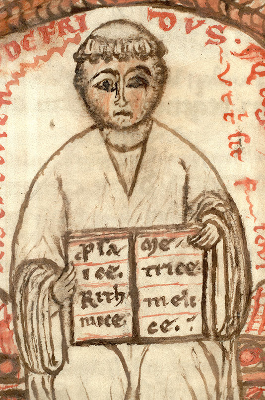 Autoportrait de Godefroid de Saint-Victor. Date : 1178-1180. Paris - Bibl. Mazarine - ms. 1002 f. 144. Sur son livre, Godefroid fait savoir qu'il pratique tous les styles littéraires : "prosa, rithmice, metrice". Le quatrain qui parcourt le fond de l'image dit ceci : "Qui legis hec avidus/age que docet hic Godefridus/Ut tibi sit fidus,/In eis cum turture nidus". Les allusions au nid et à la tourterelle proviennent du Psaume 83,4 ("le passereau lui-même trouve une maison, la tourterelle un nid pour mettre sa couvée"). Il désignent le fidèle et l'Eglise (cf. P. Stirnemann).